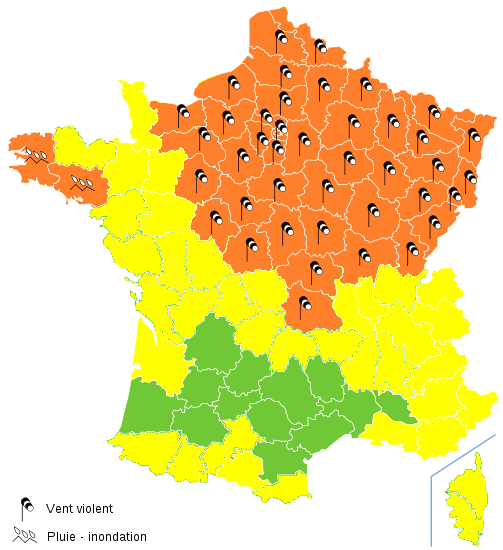 Carte vigilance meteo france 28 février 2010 10:28